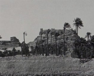 منظر لقلعة زعبل فوق أحد المرتفعات.